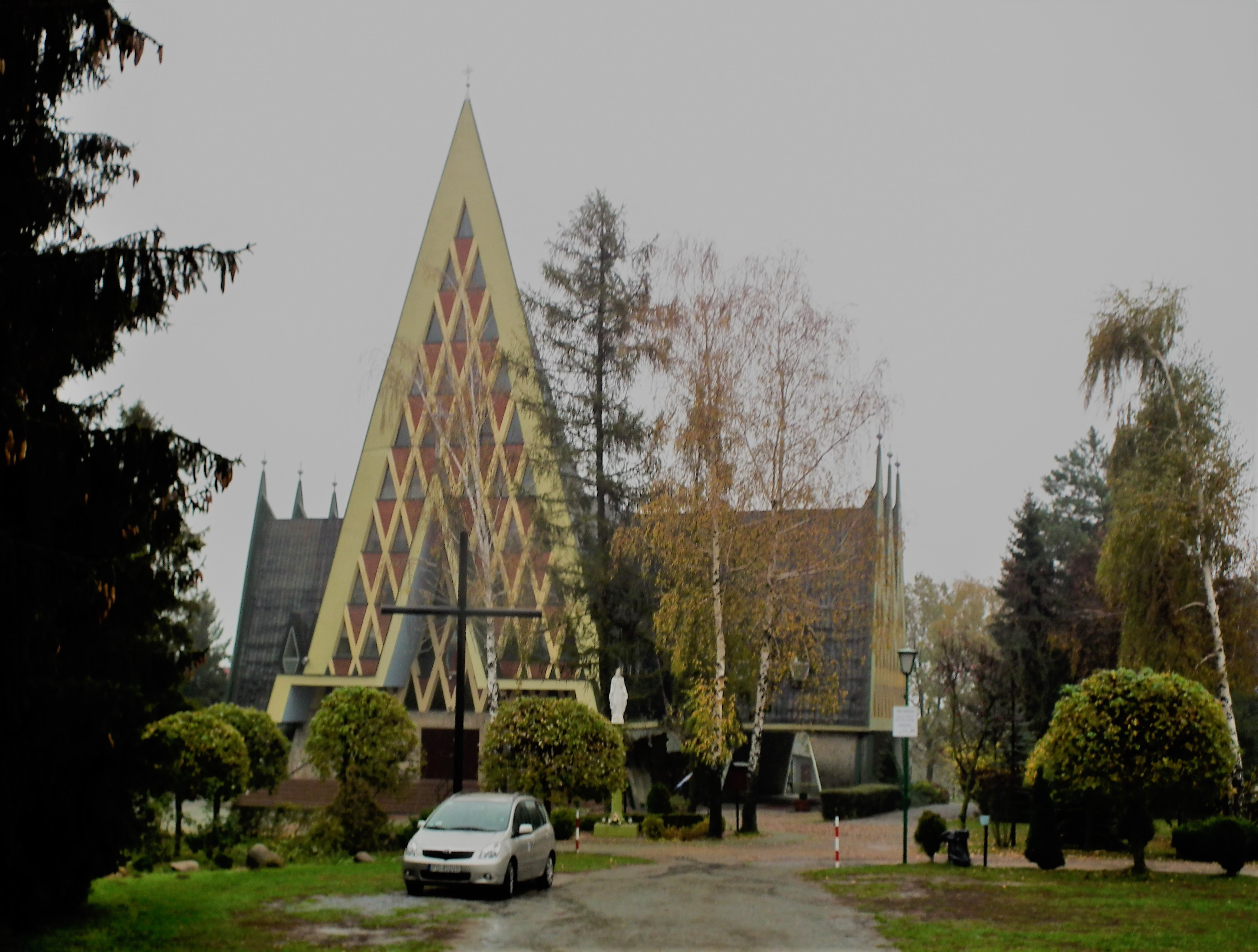 Katedra Polskokatolicka w Kotłowie.